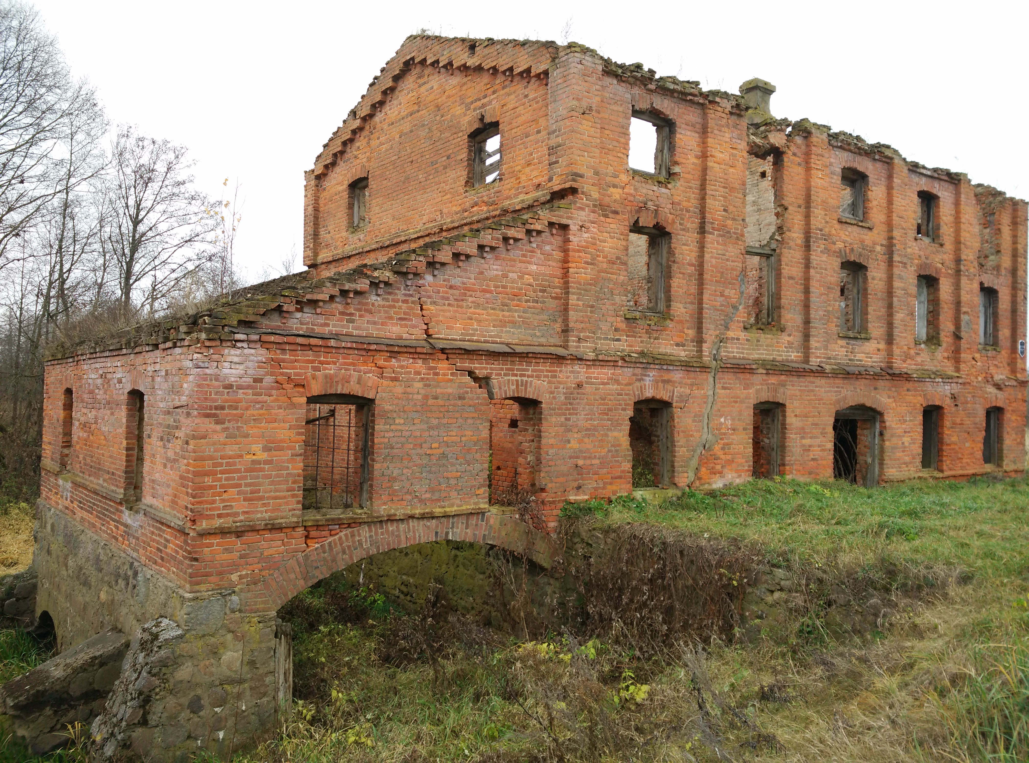 Вадзяны млын ля вёскі Каменнае Крывое.